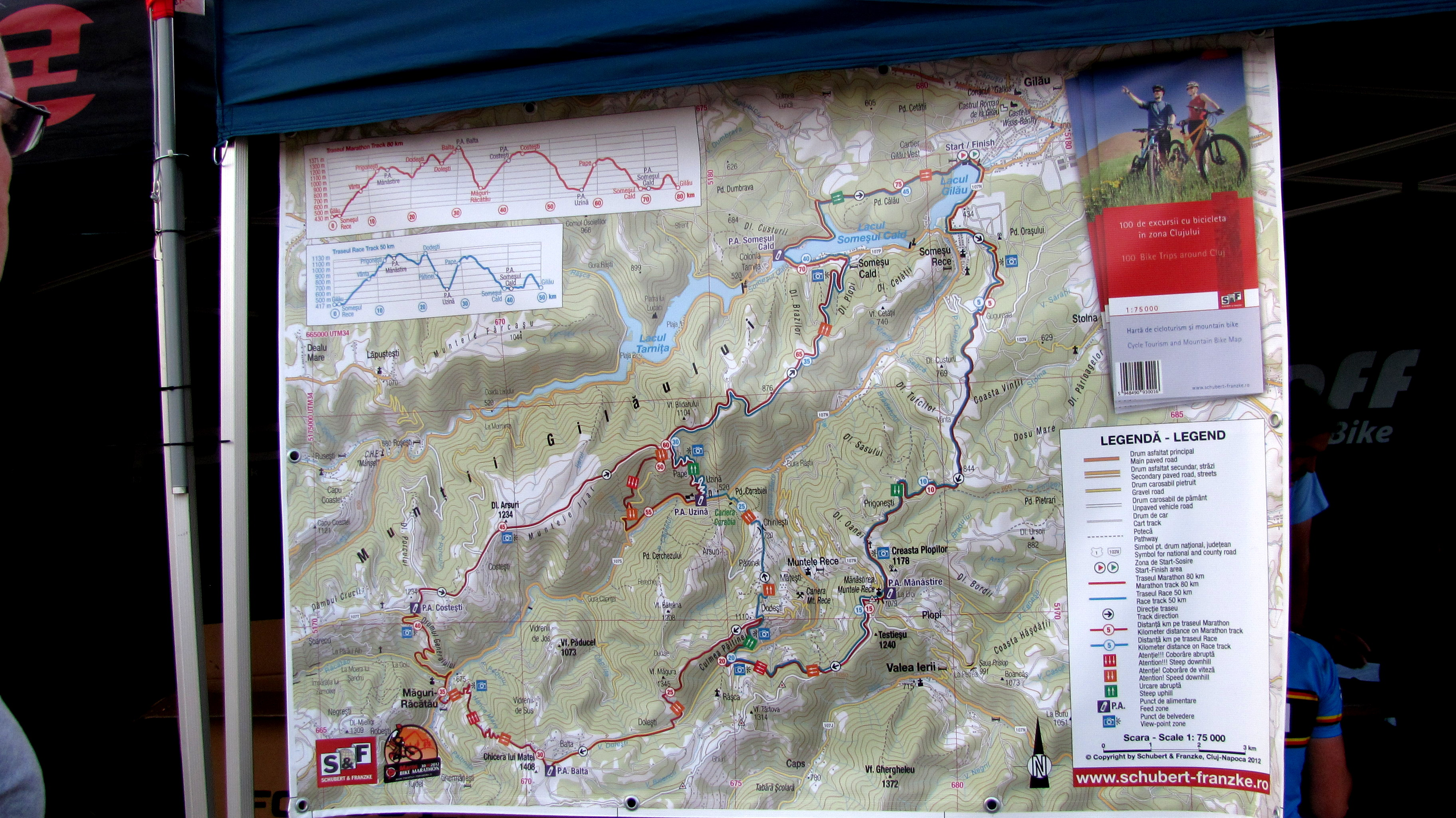 Gilău-Cluj - panou informativ